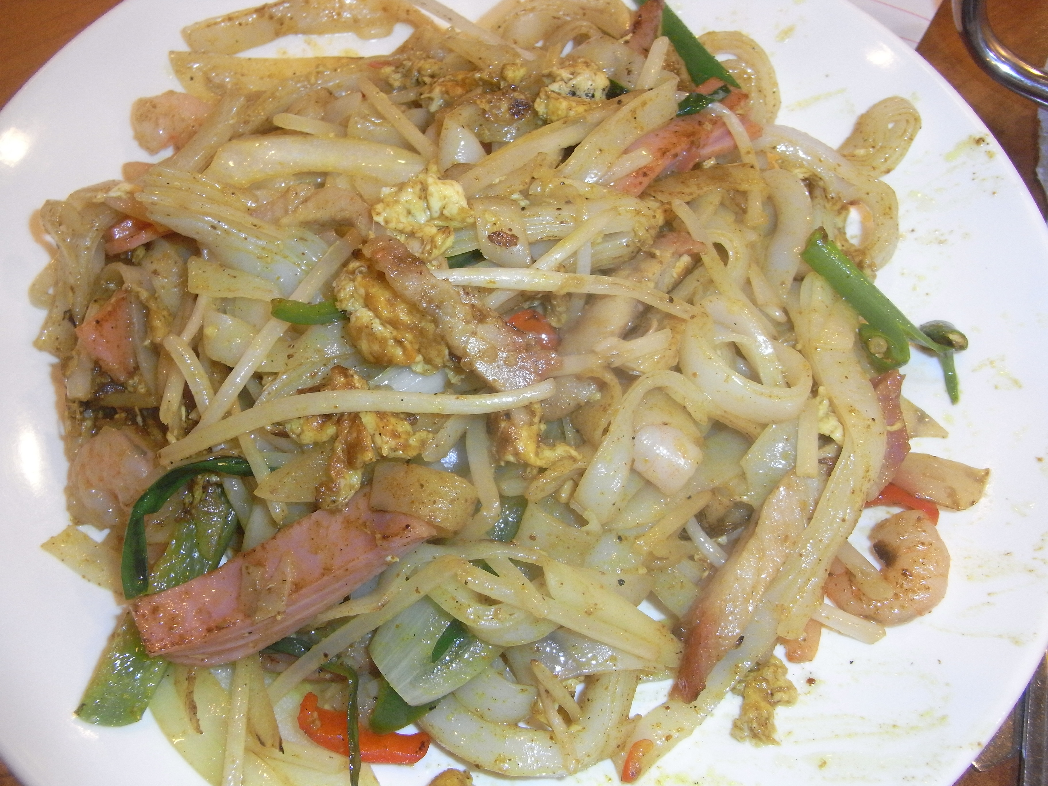 中文（香港）: 文華新村炒貴刁zh:下午茶餐